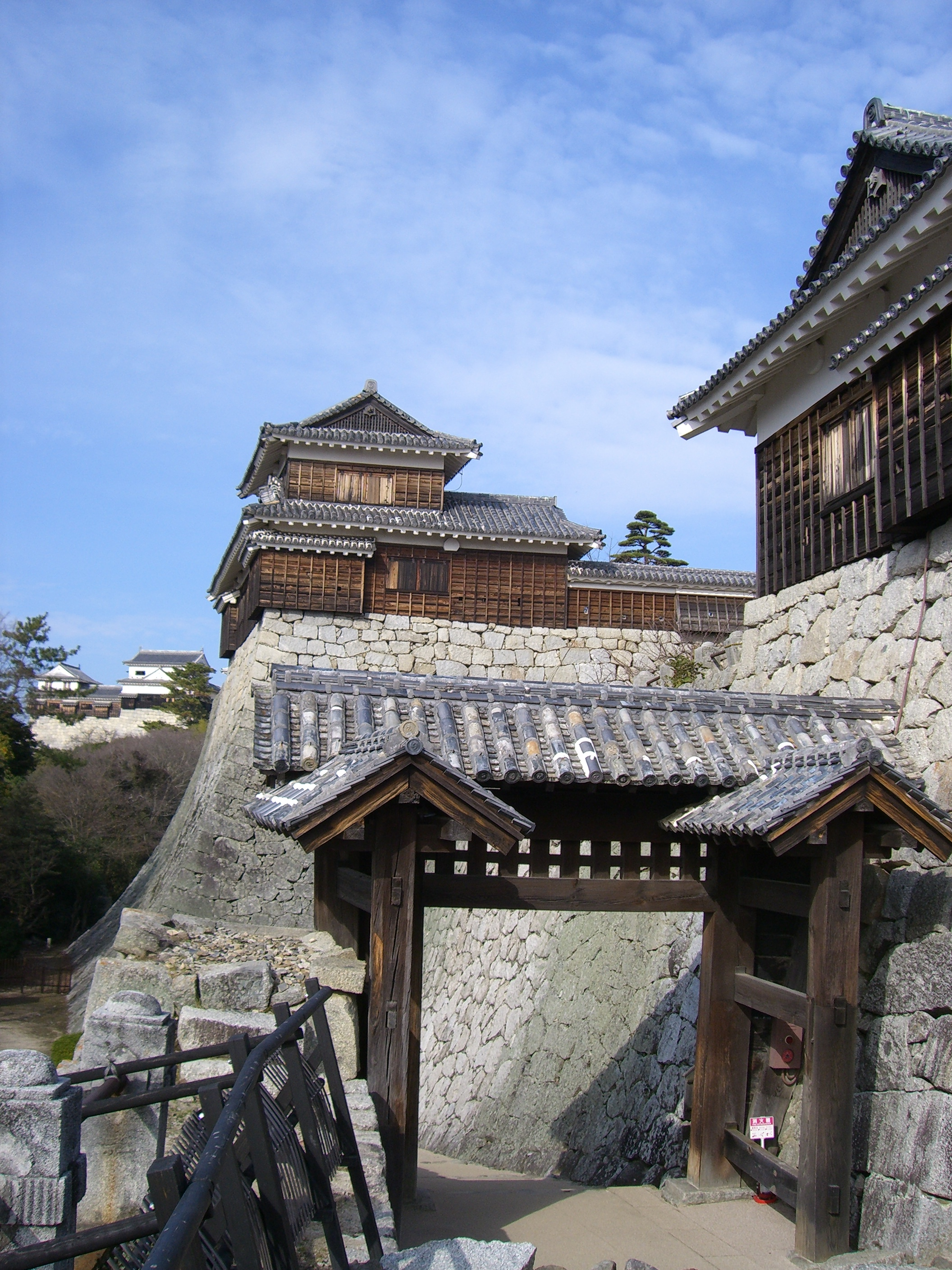 松山城戸無門（伊予国）。